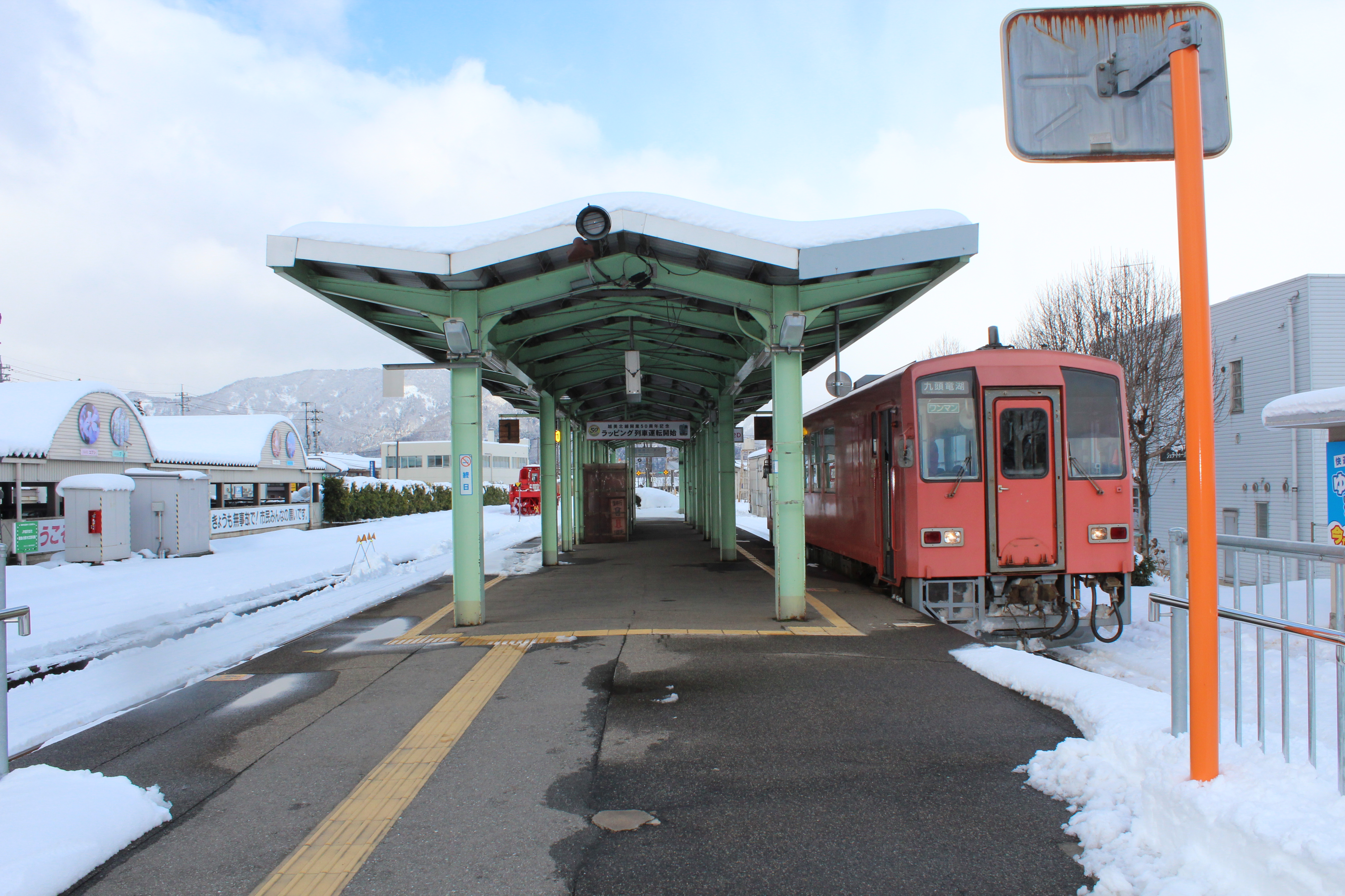 キハ120停車中のホーム